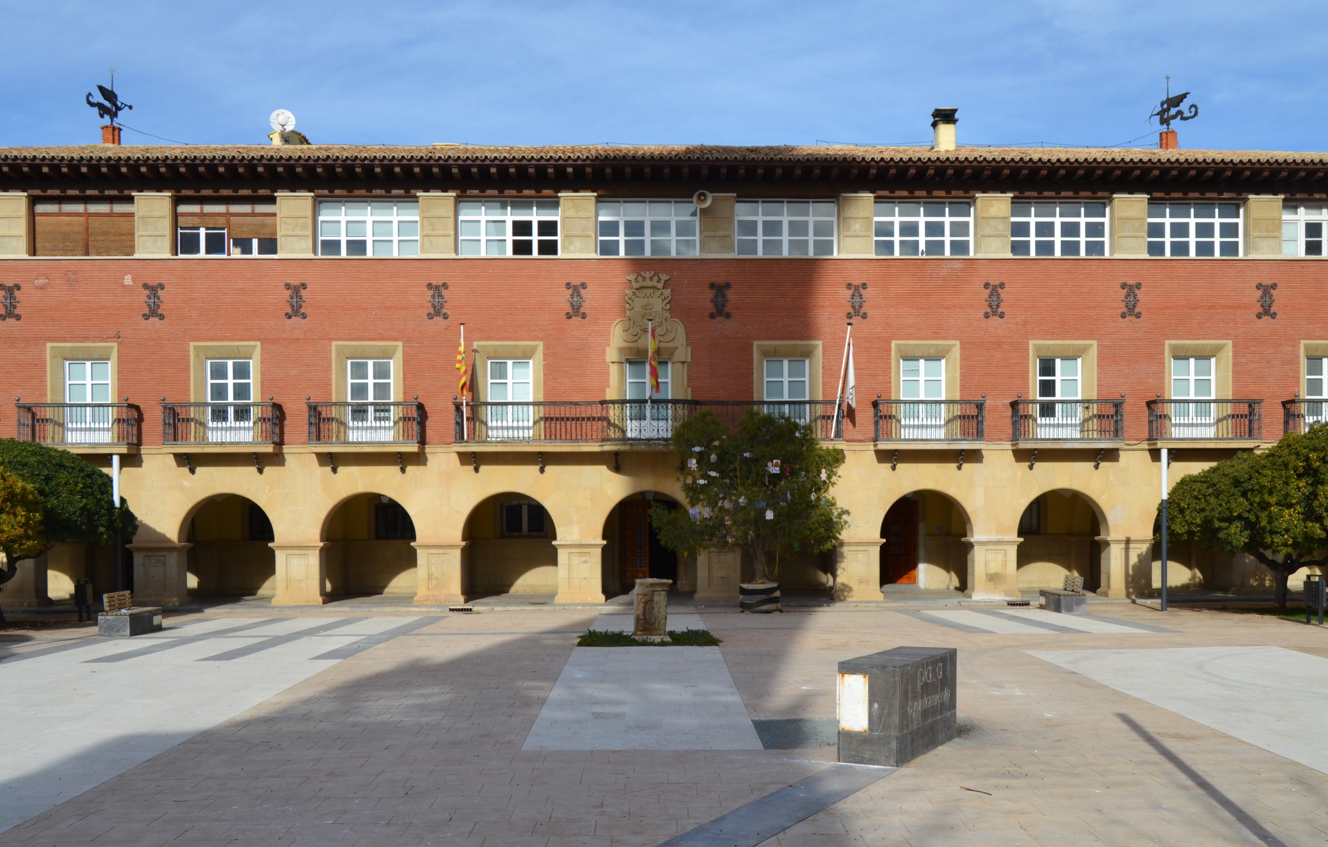 Ajuntament de Belchit.